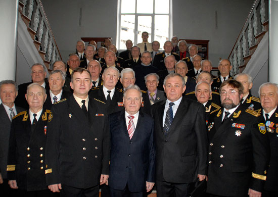 Военно-научное общество Черноморского флота. В центре - советник начальника Генерального штаба Вооруженных Сил Российской Федерации, командующий Черноморским флотом(1991-1992) адмирал Игорь Касатонов